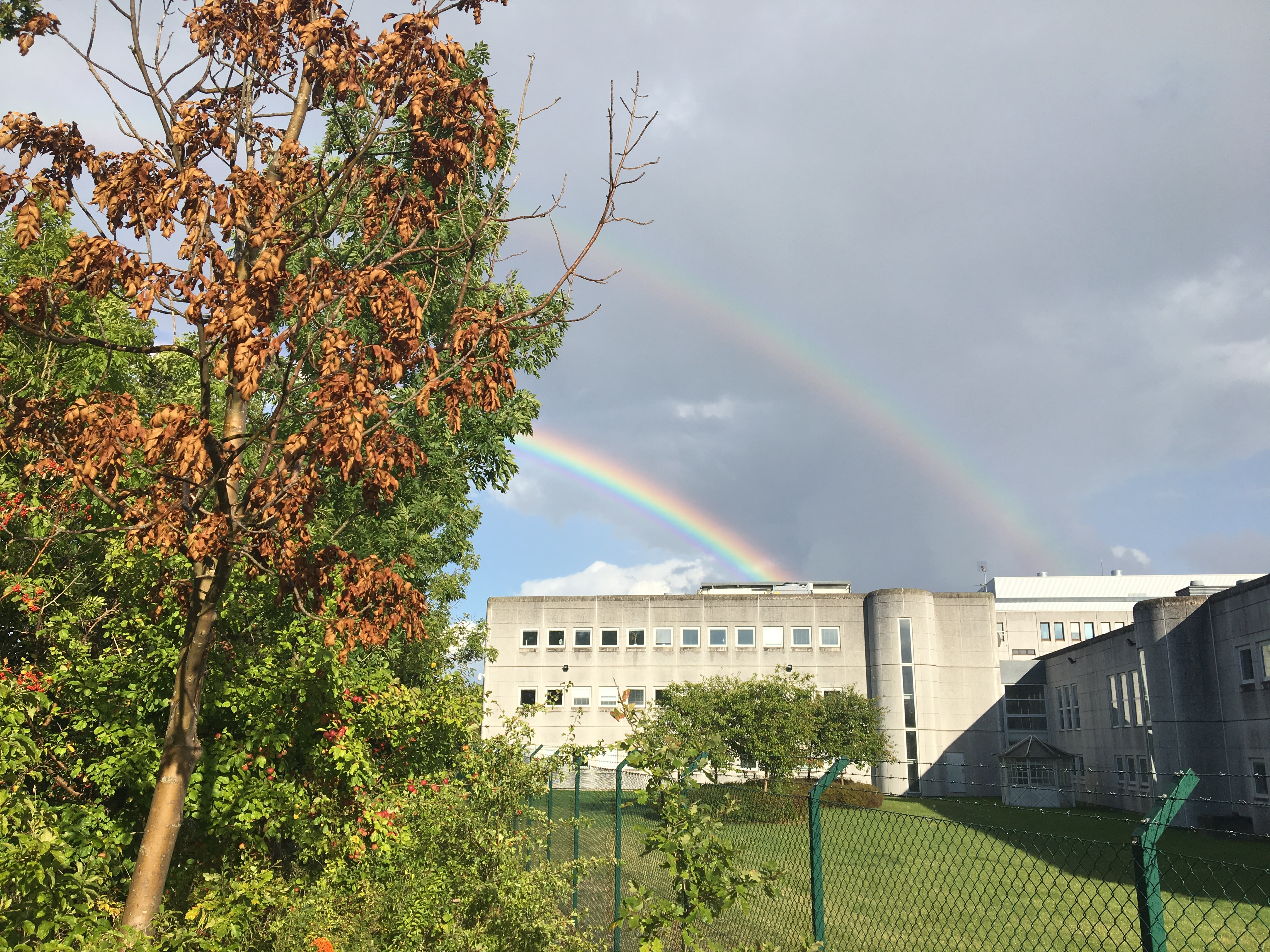 FMI KAKI i 2019